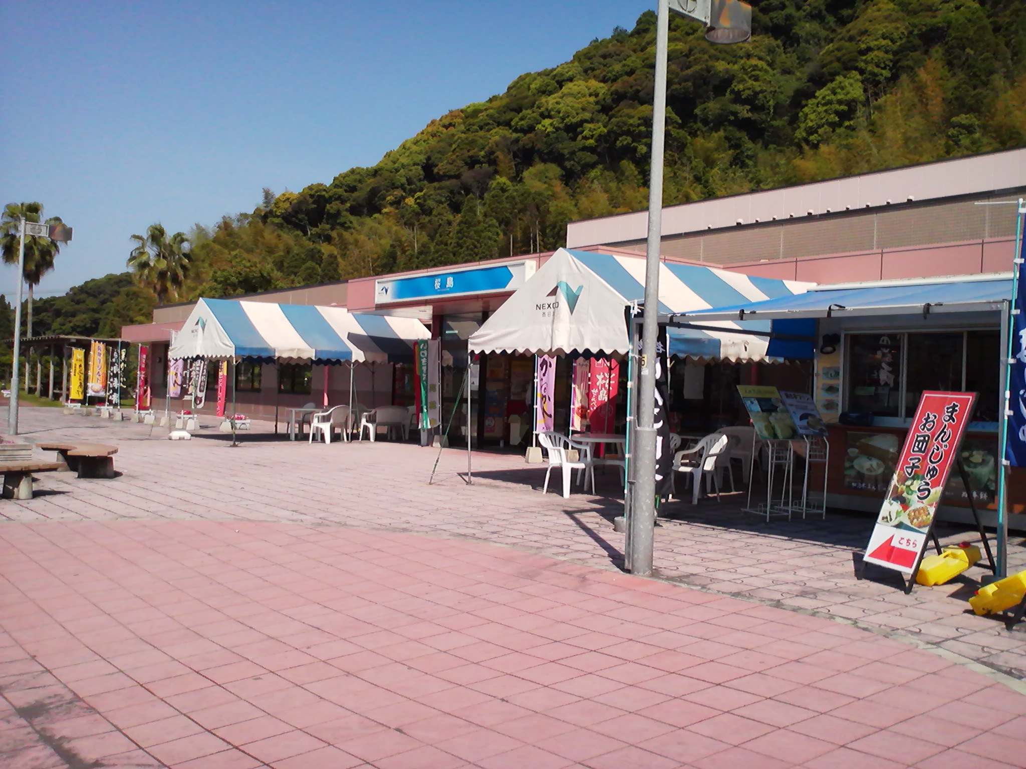 桜島サービスエリア上り線の外観。